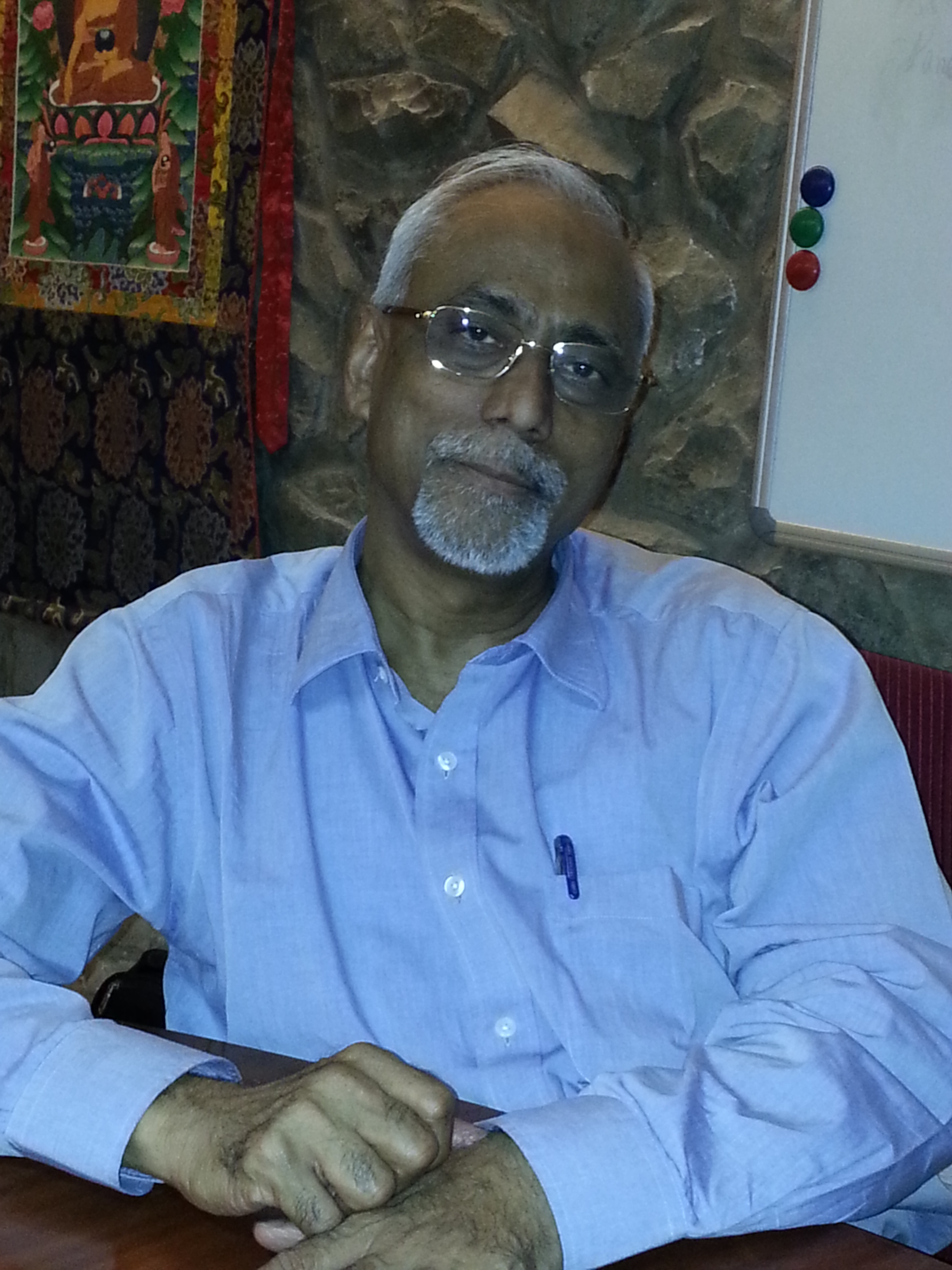 Parasuraman TISS Director